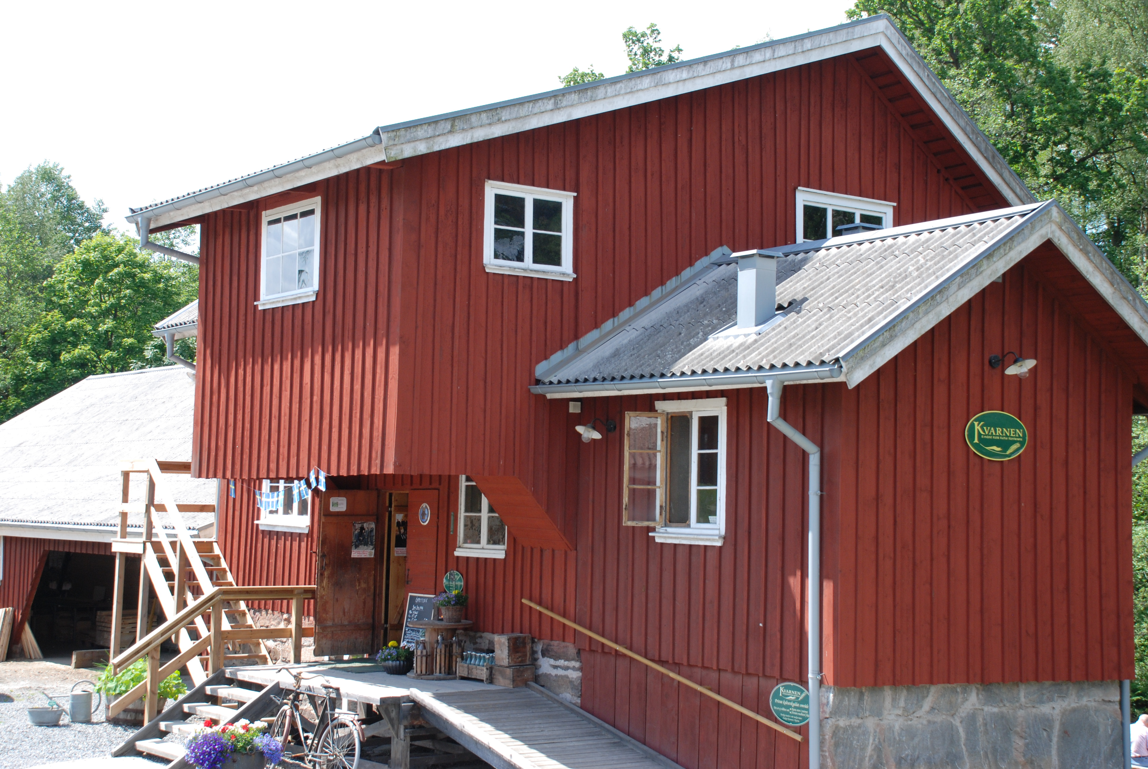 Melltorps kvarn i Hyssna, Marks kommun.